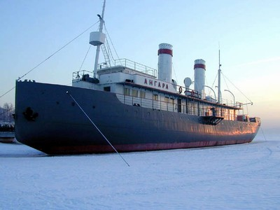 ледокол "Ангара" на приколе в Иркутске